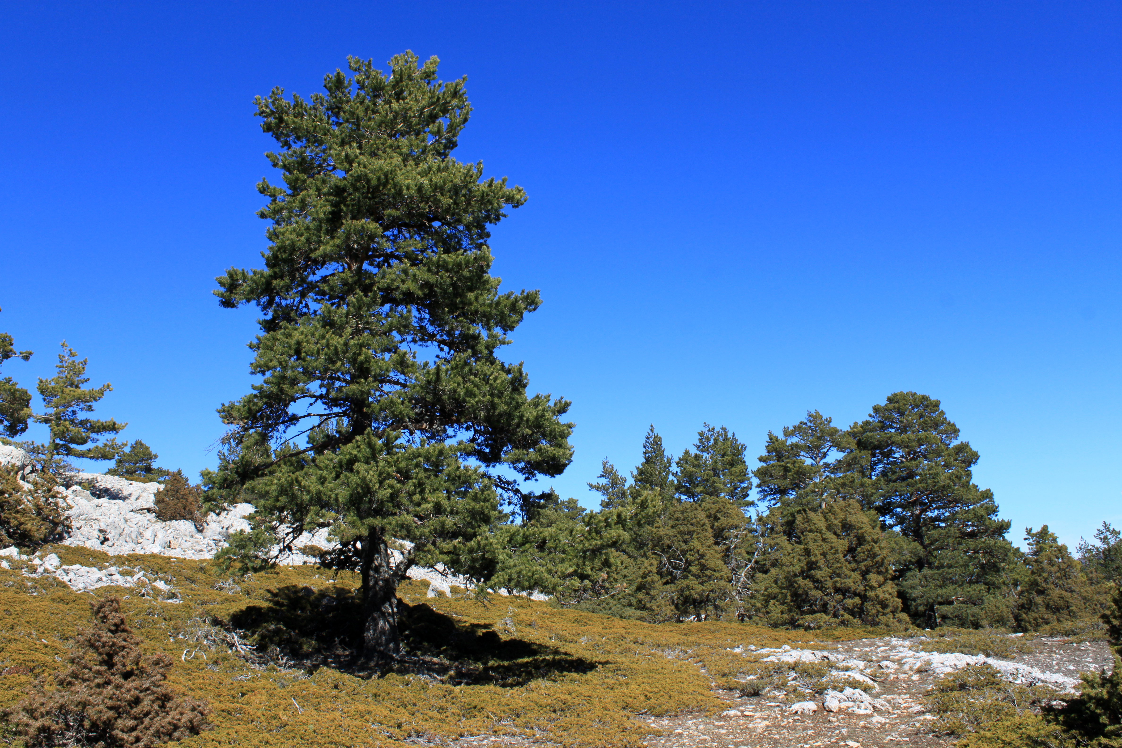 Vista del Alto de las Barracas, también llamado Cerro Calderón, situado en el parque natural de Puebla de la San Miguel. Perteneciente a la Sierra de Javalambre su punto más alto alcanza los 1837 metros. Puebla de San Miguel, provincia de Valencia, Comunidad valenciana, España.